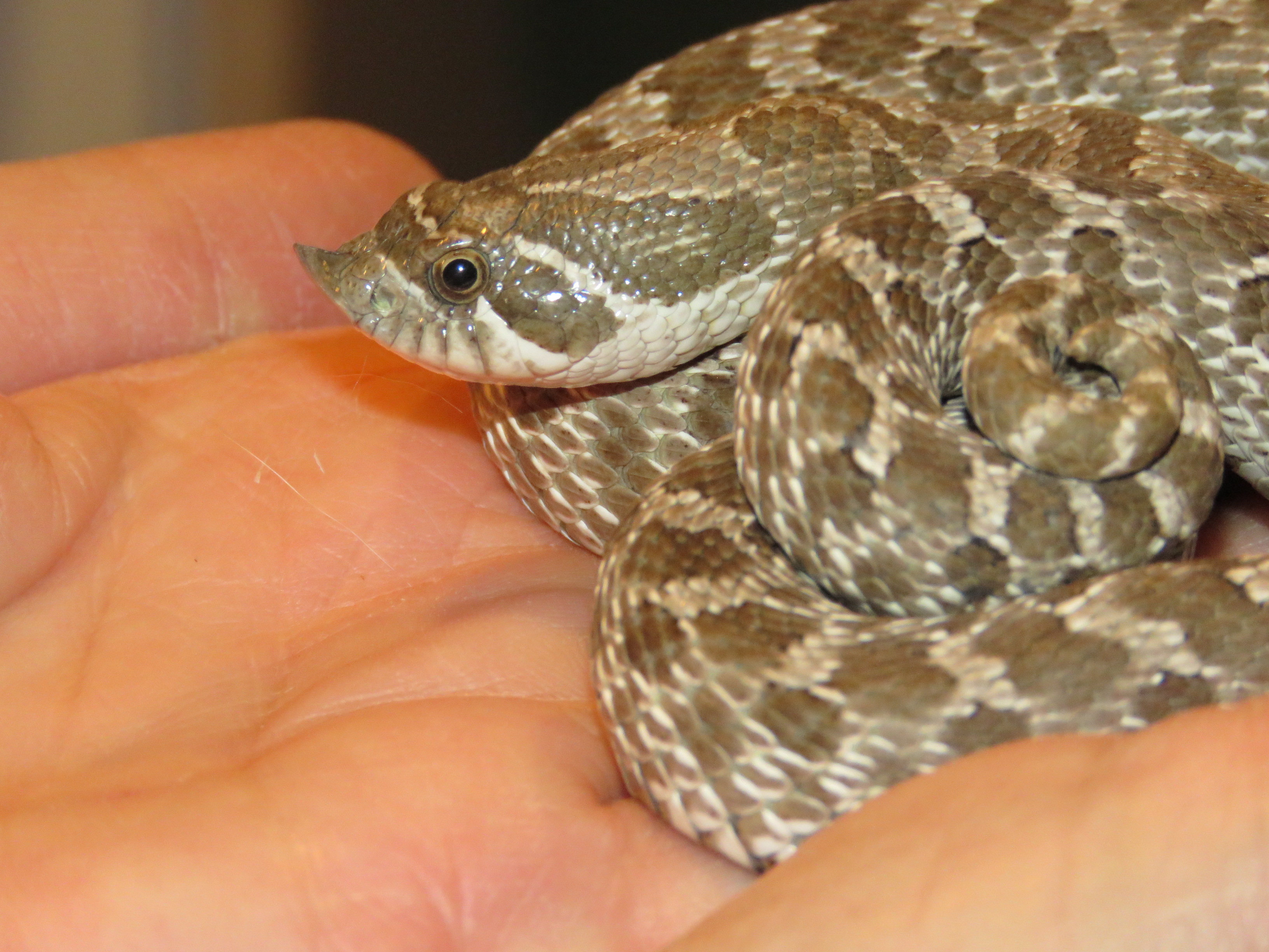 Hier sieht man die Hakennase gut im Profil.